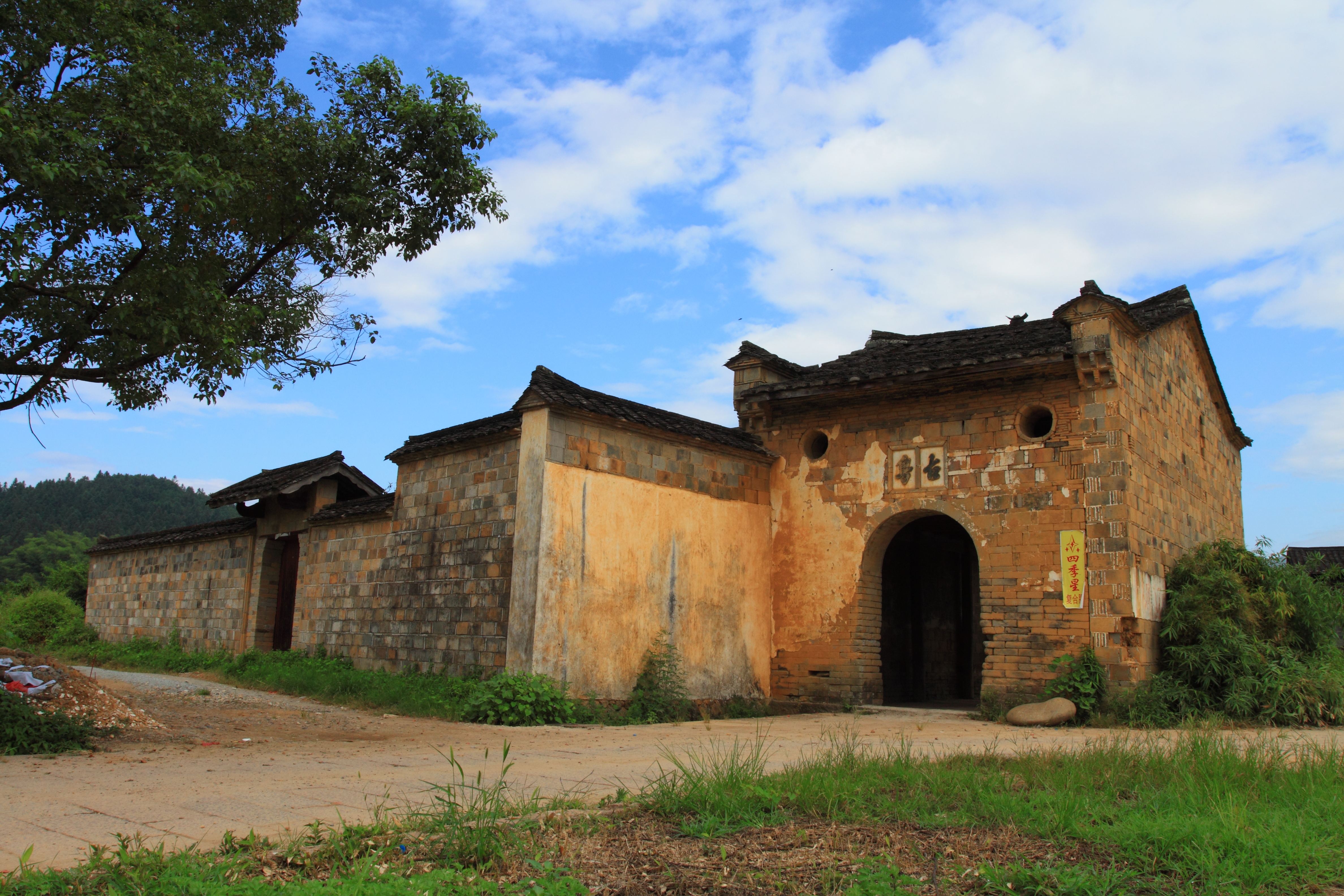 古粤门楼